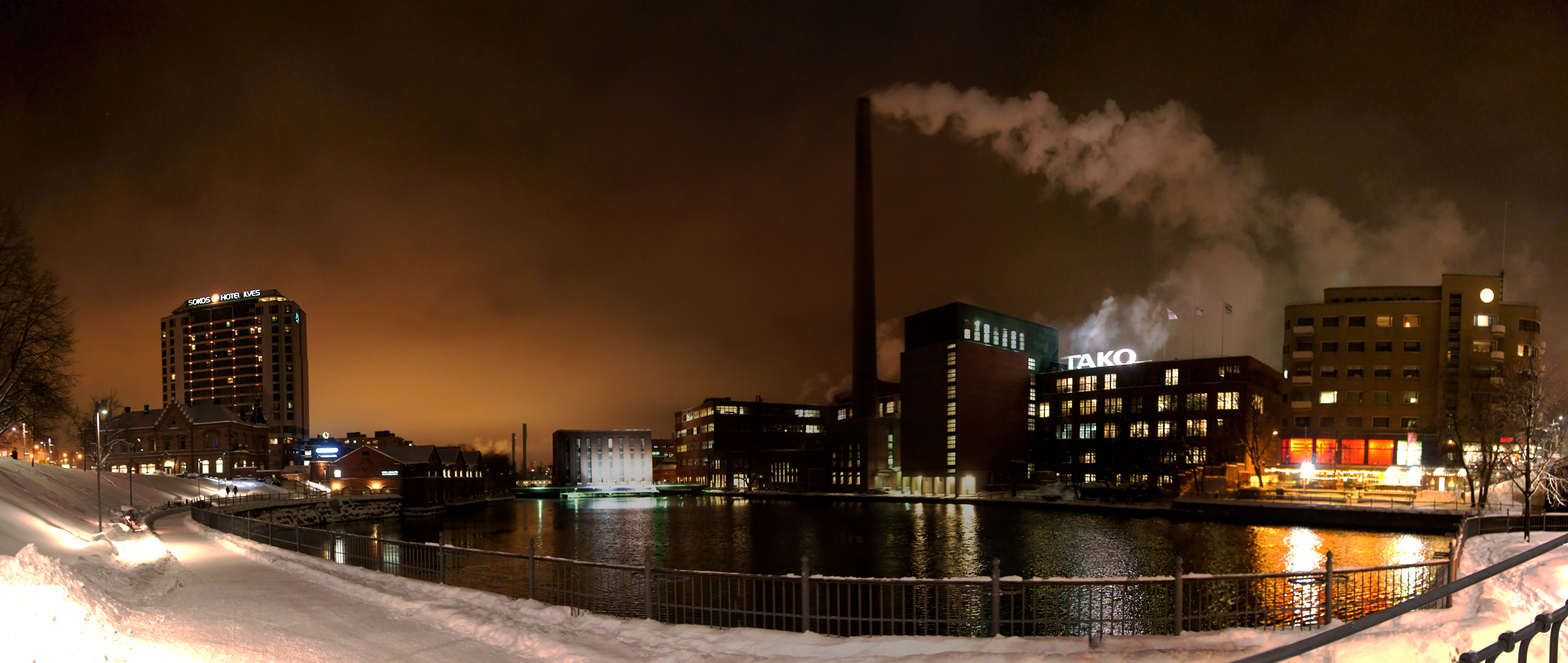 Takon kartonkitehdas ja Tammerkosken maisemaa.